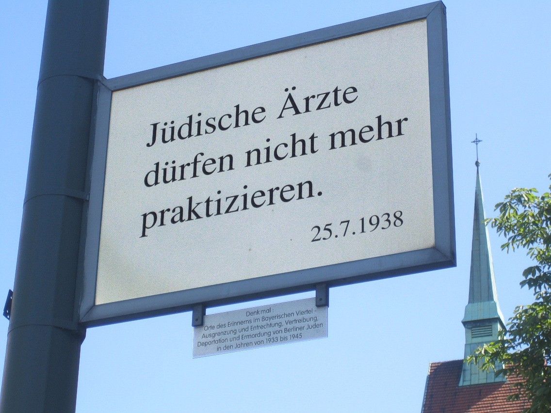 Berlin-Schöneberg, Bayerisches Viertel. Denkmal zur Erinnerung an die Unterdrückung der Juden 1933-1945. Tafel zum Berufsverbot für Ärzte an der Heilbronner Straße Ecke Barbarossastraße.